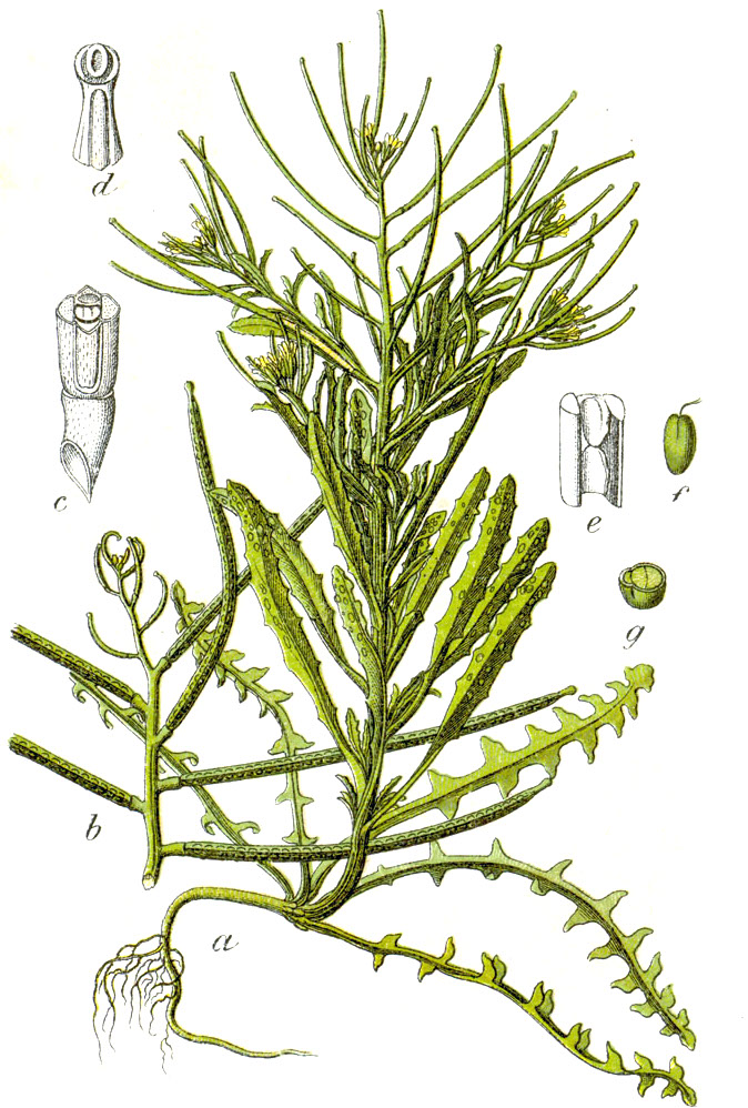 Erysimum repandum L., syn. Crucifera repanda E.H.L.Krause Original Caption Ausgeschweifter Hederich, Crucifera repanda